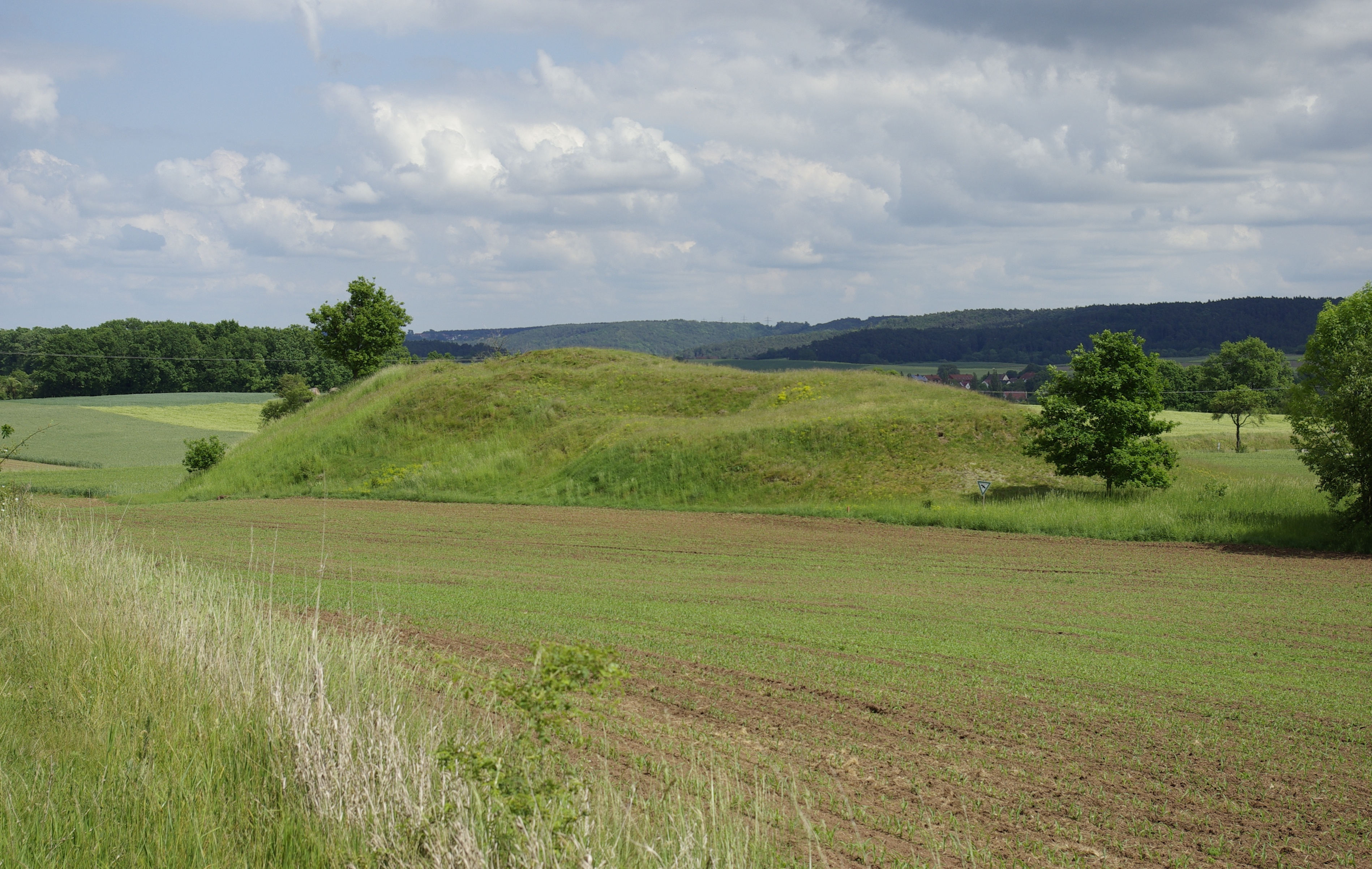 Sandheidehügel bei Obernzenn, Geotop 575R001.